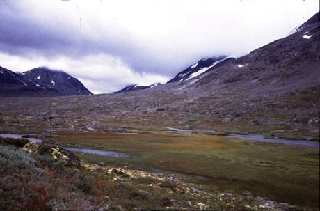 Nationaal Park Jotunheimen in Noorwegen